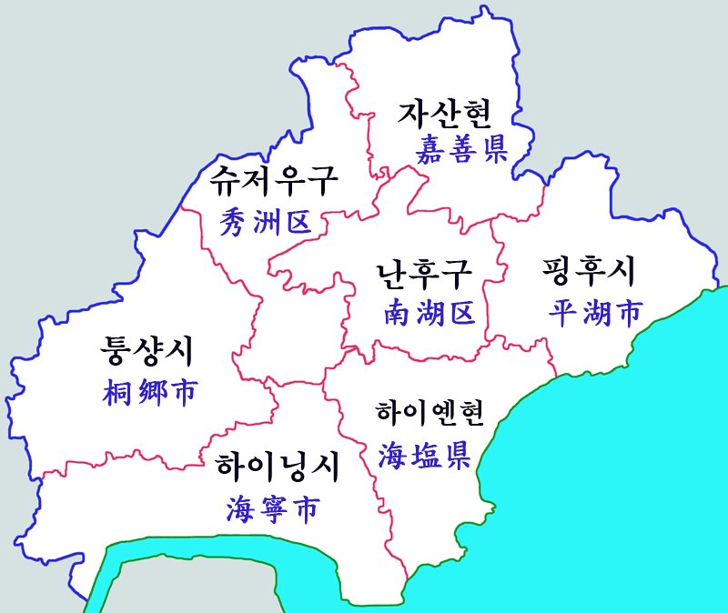 저장성 저상시 현급구역도